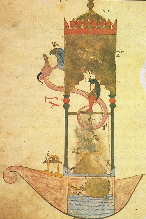 L'horloge hydraulique du bateau d'al-Jazari.